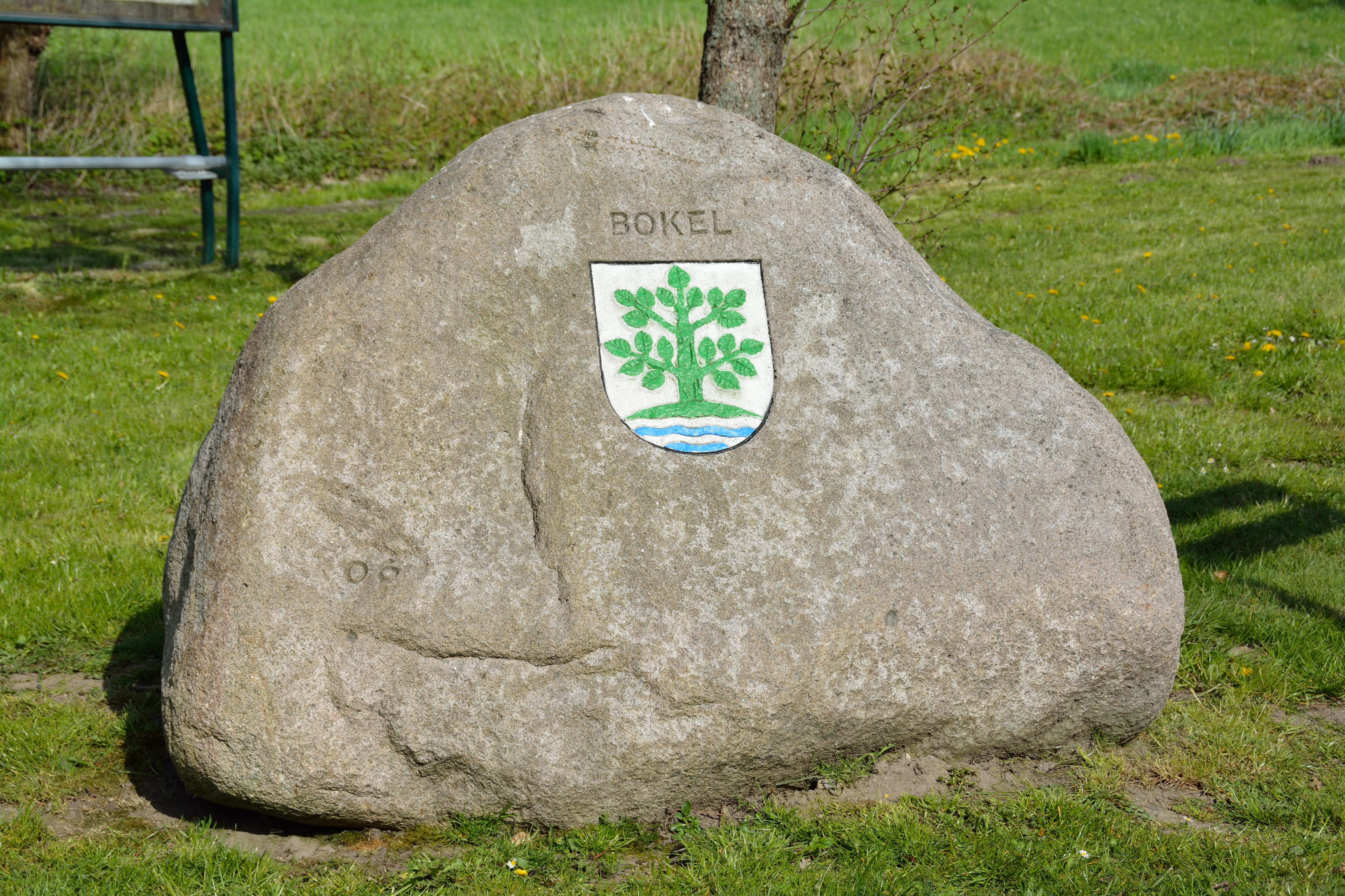 Impressionen aus Bokel Findling am Zugang zum Mühlenteich